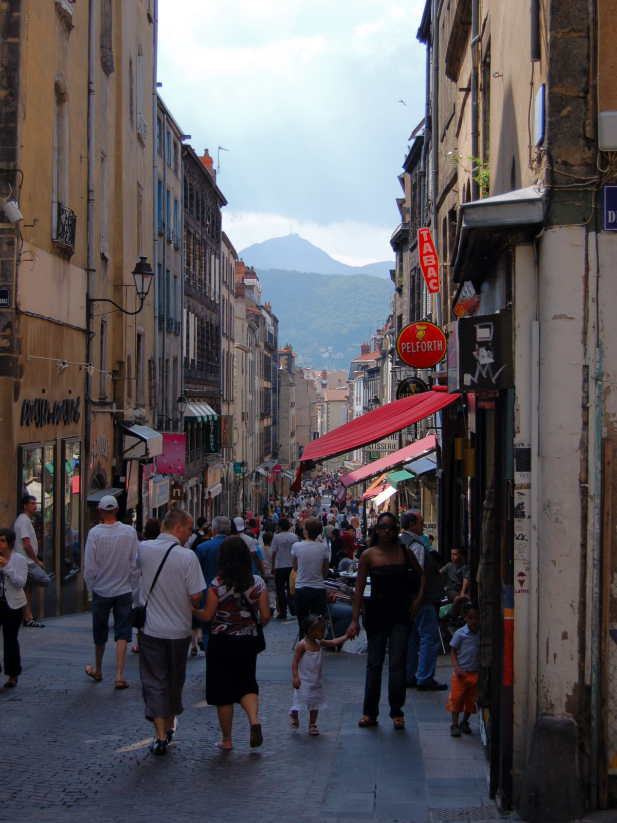 Rue des Gras à Clermont-Ferrand